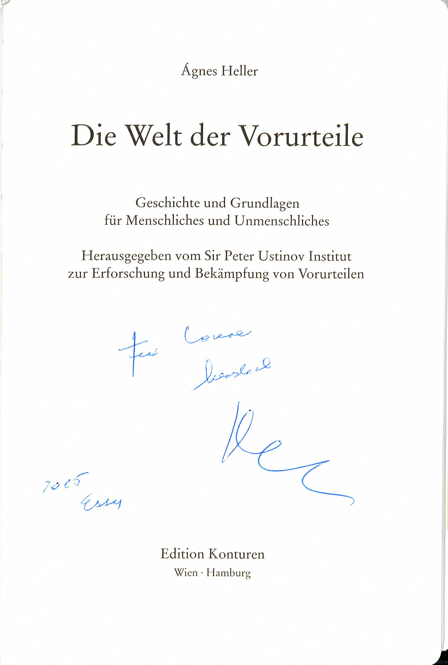 Die Welt der Vorurteile. Geschichte und Grundlagen für Menschliches und Unmenschliches. Peter Ustinov Institut. Edition Konturen, Wien-Hamburg 2014, Titelblatt und Widmung mit Signatur 2015